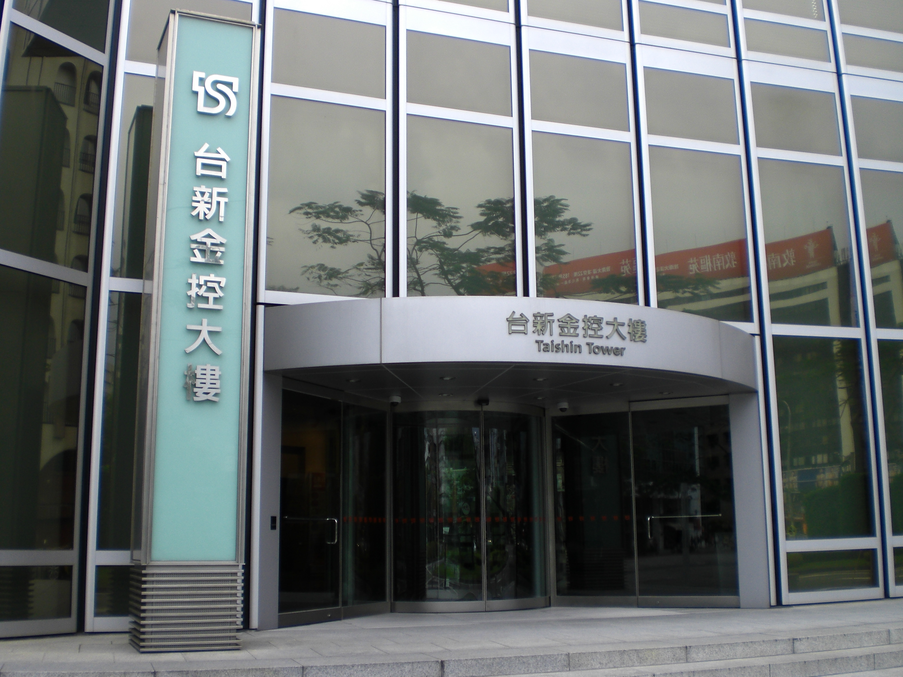 台新金控大樓大門。